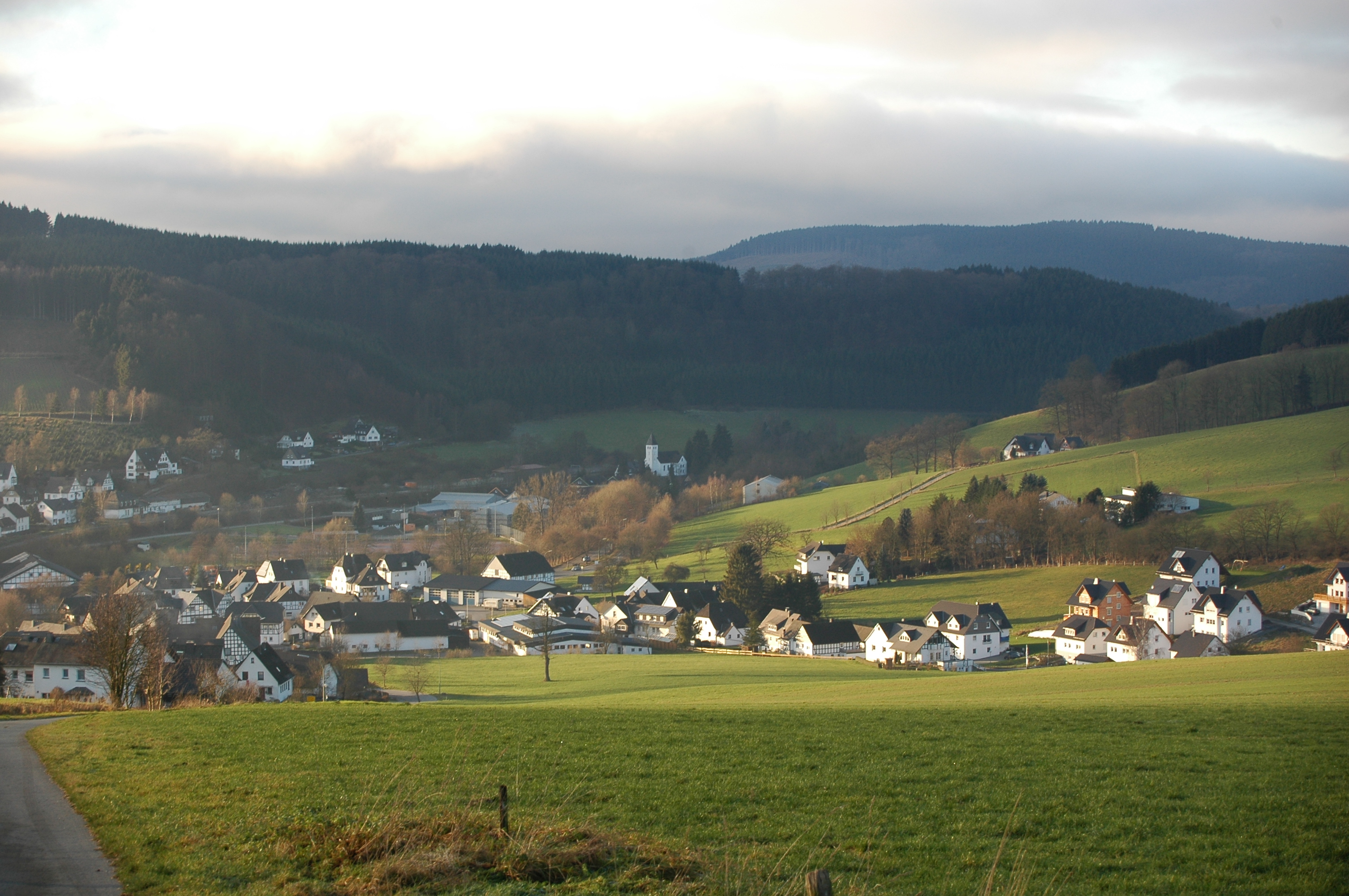 Schmallenberg-Dorlar, Hochsauerlandkreis, Nordrhein-Westfalen